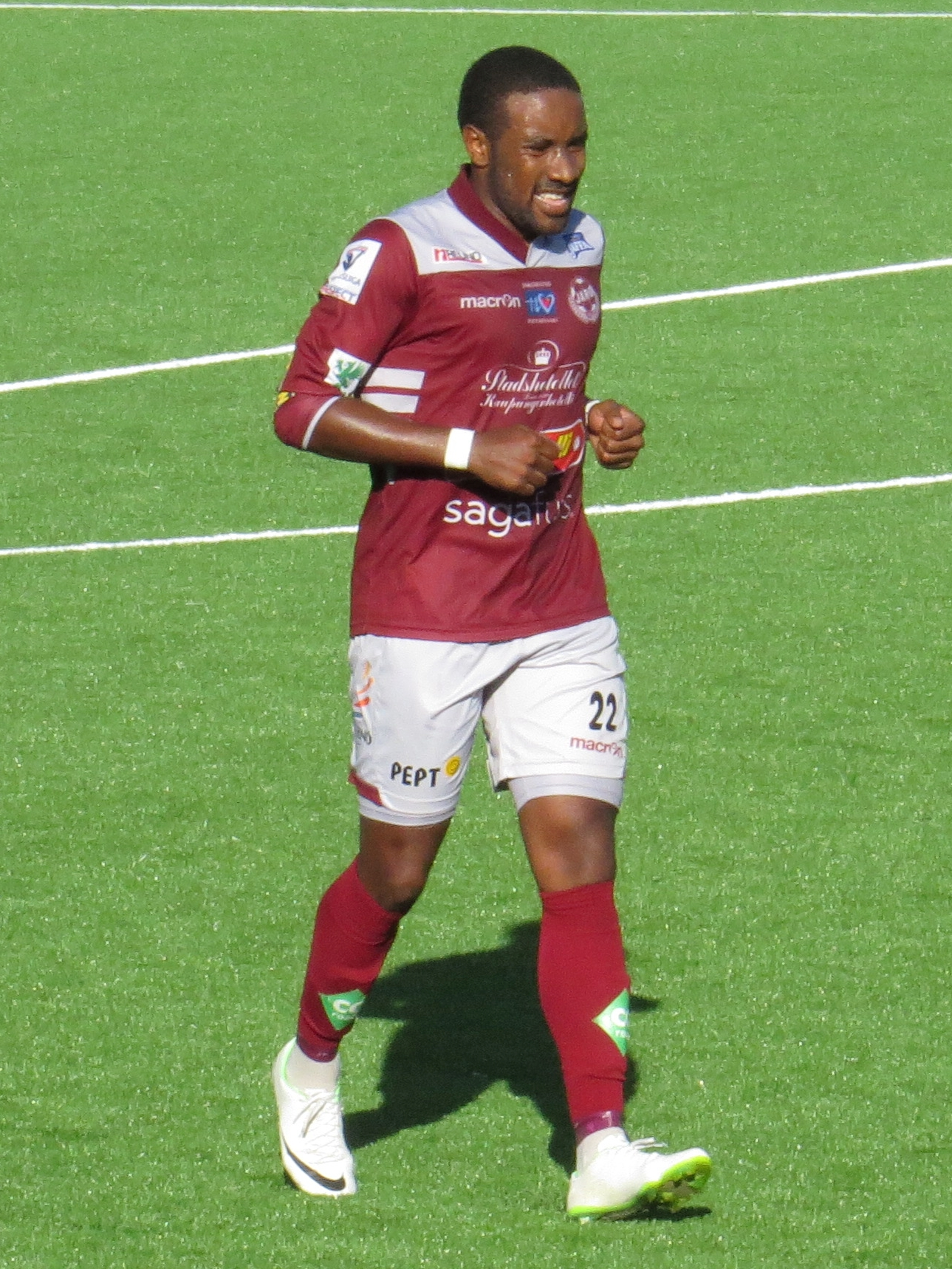 Jamar Dixon, kanadalainen jalkapalloilija FF Jaron joukkueessa kaudella 2015.